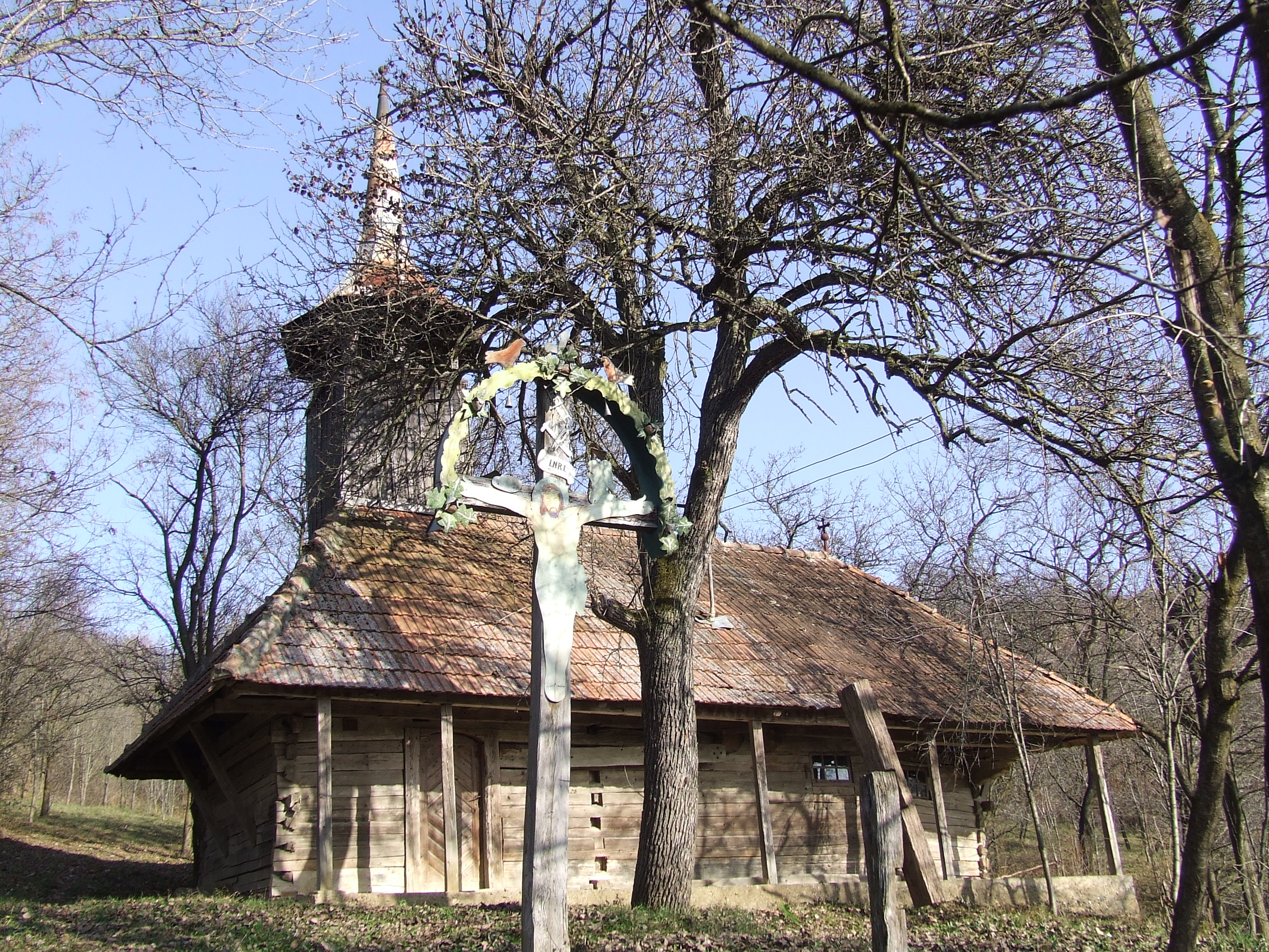 Biserica de lemn din Chesău, judeţul Cluj.